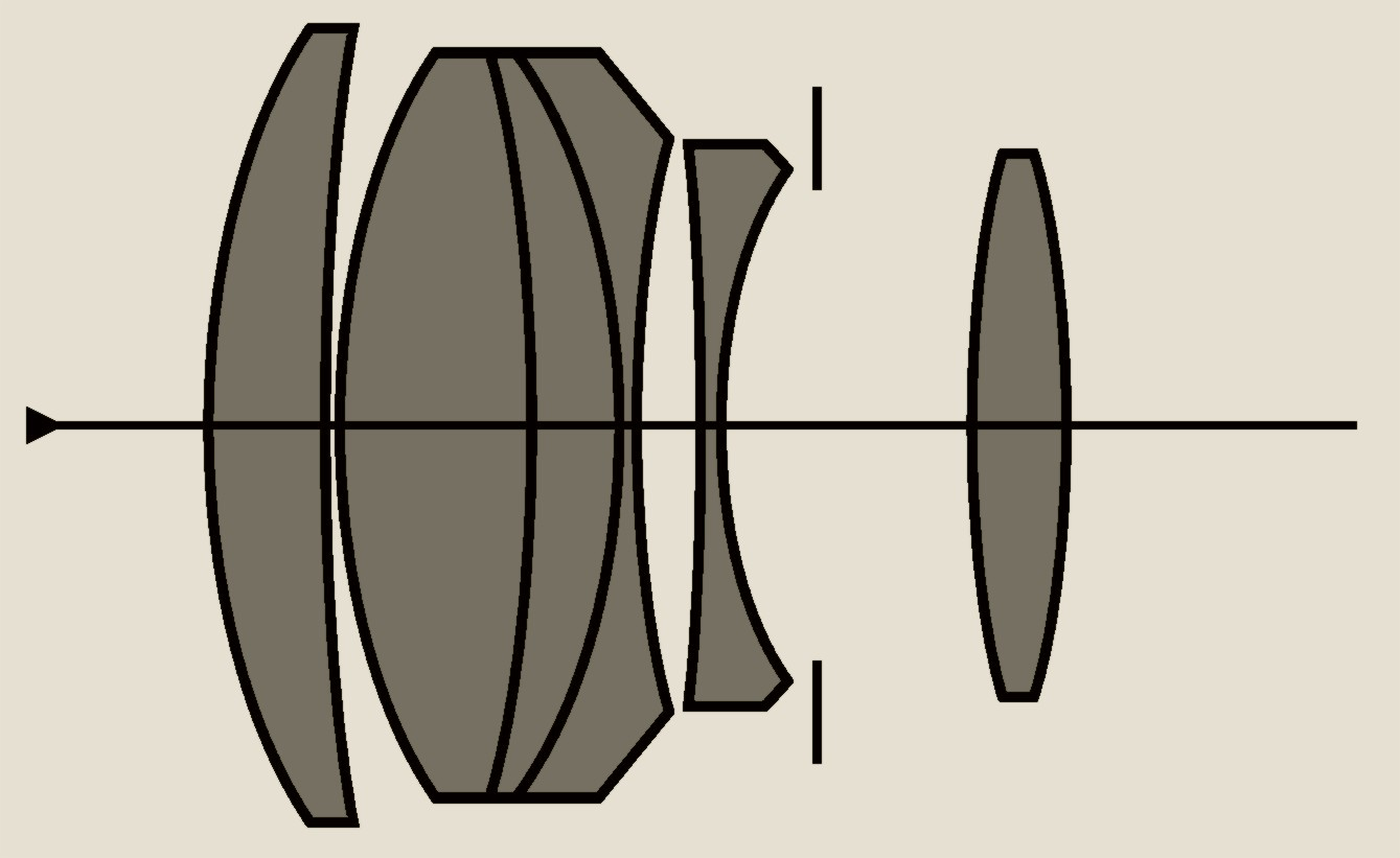 Ernemann Anastigmat „Ernostar“ 1 : 1,8 f = 10,5 cm Linsenschnitt